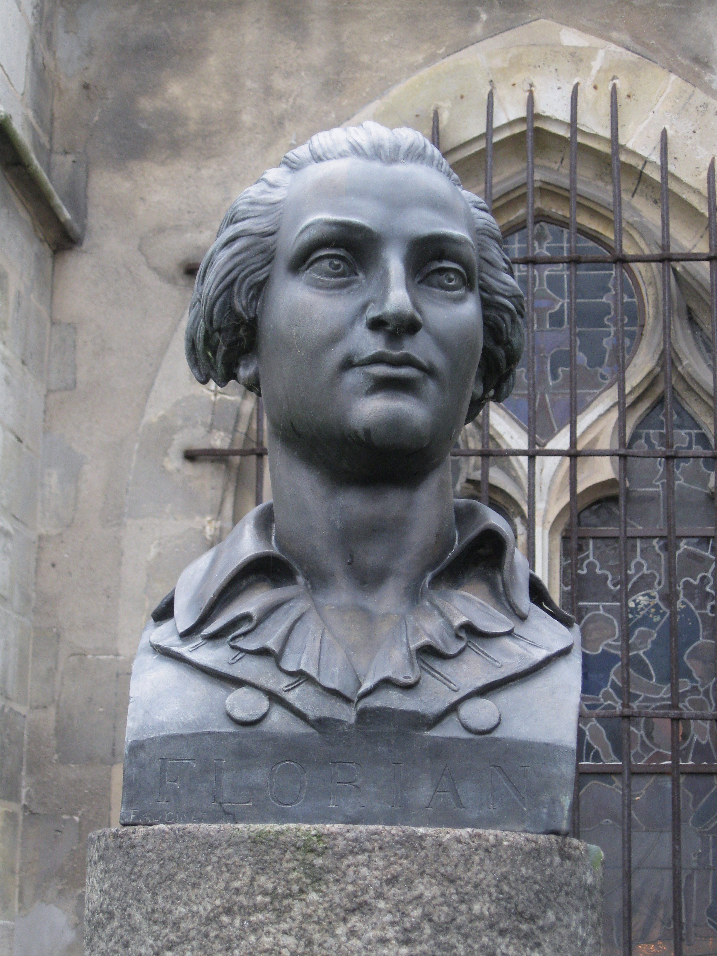 Buste de Jean-Pierre Claris de Florian (1755-1794), sur sa tombe dans le Jardin des Félibres, Sceaux, Hauts-de-Seine, France